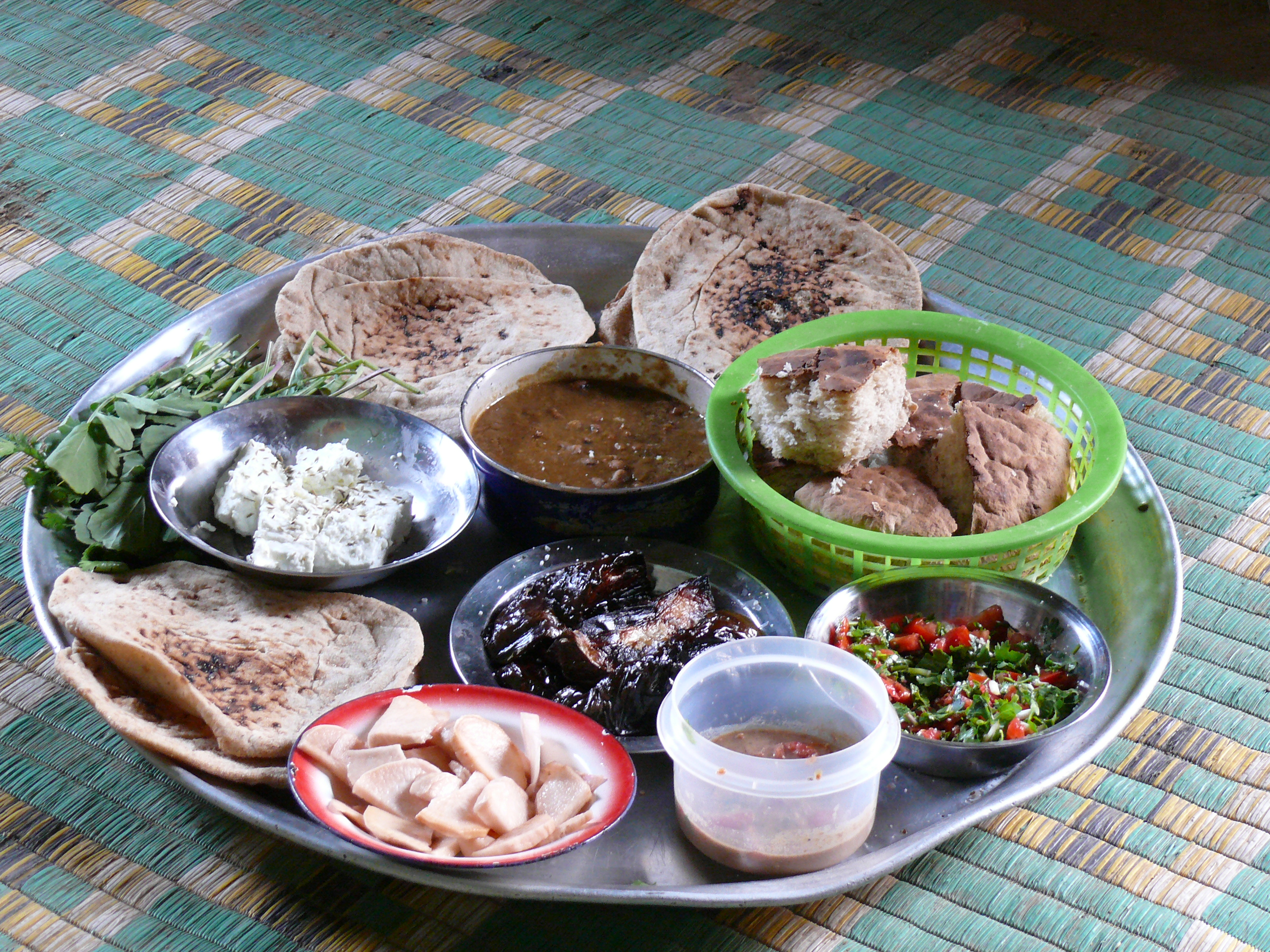 Frühstückstisch für die Arbeiter an einer Ausgrabung in al-Qurna/Ägypten